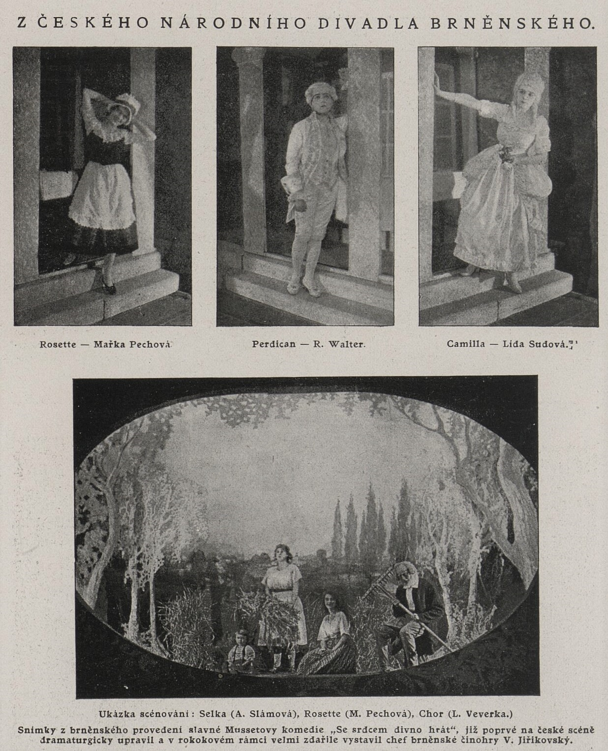 Se srdcem divno hrát, inscenace v Národním divadel vNrmě roku 1917